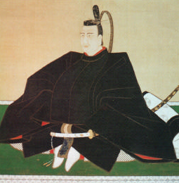 松平光通の肖像。